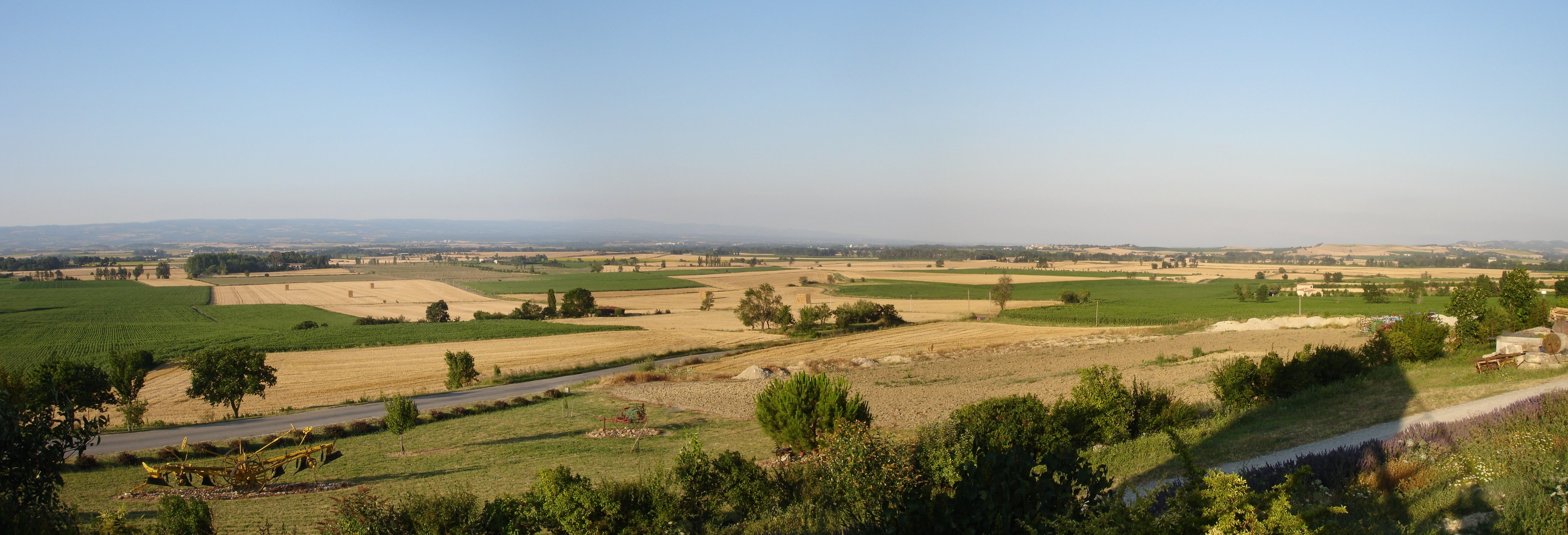 Villasavary (Aude, Languedoc-Roussillon, France) : Panorama de la plaine du Lauragais.